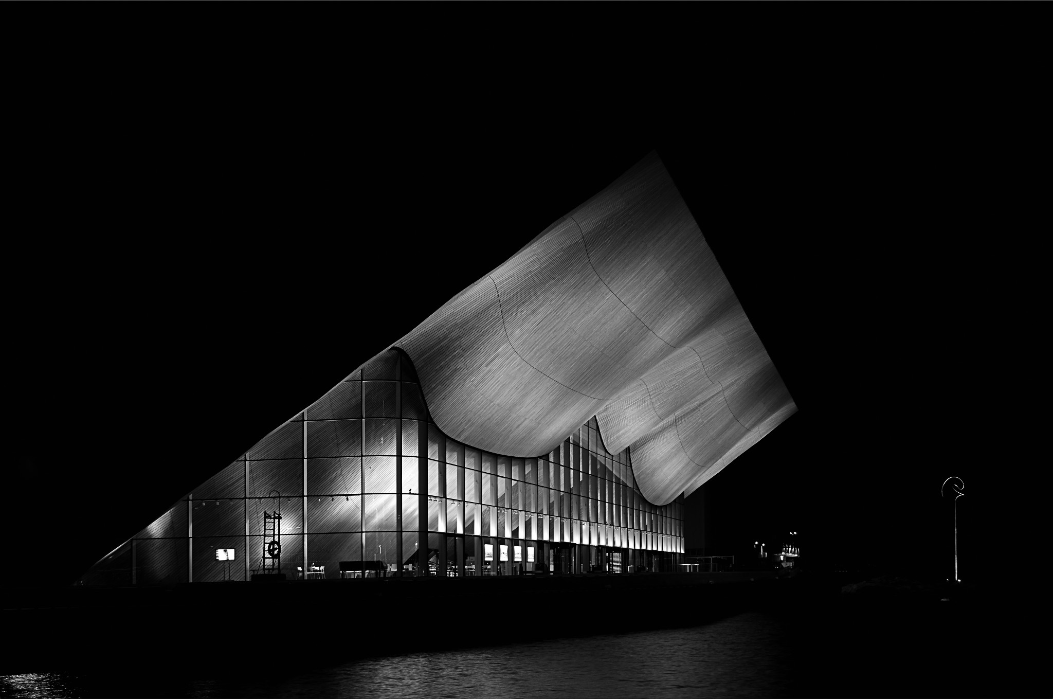 Kilden konsert og teaterhus, Kristiansand